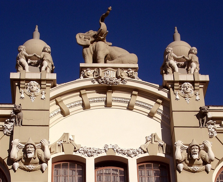 Detalhe da fachada do prédio da antiga Cervejaria Brahma, em Porto Alegre, Brasil, obra do atelier de decoração de João Vicente Friedrichs.